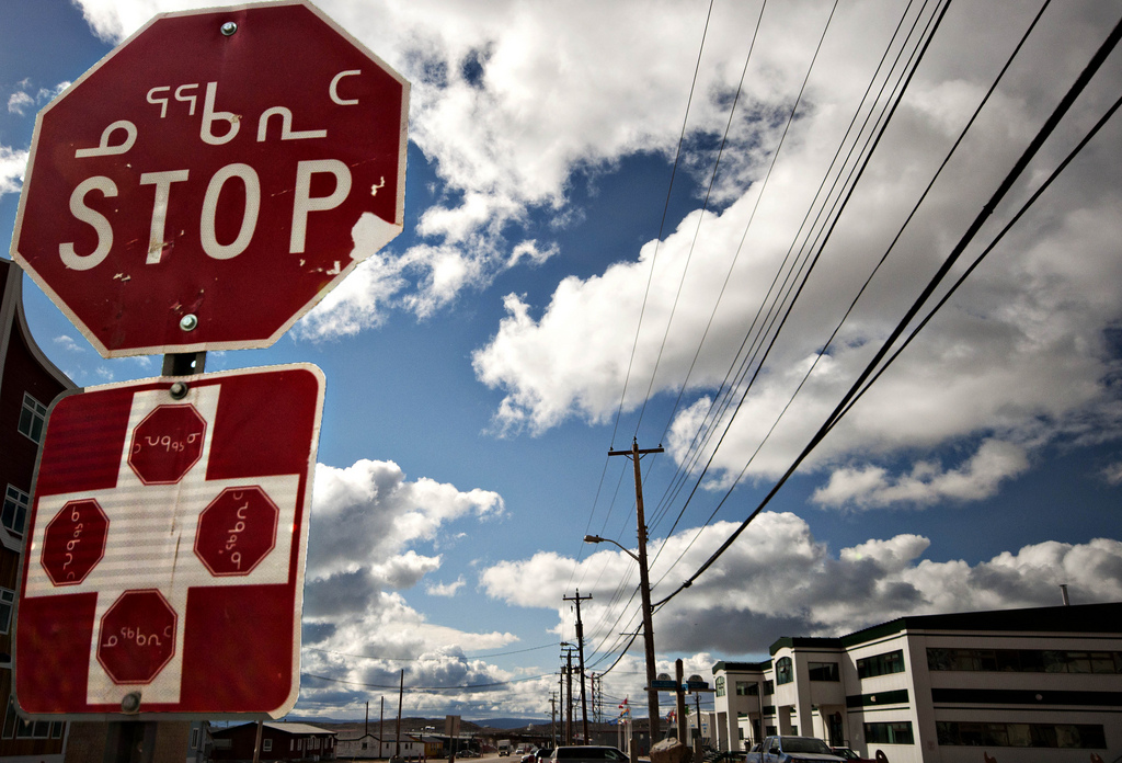 Iqaluit